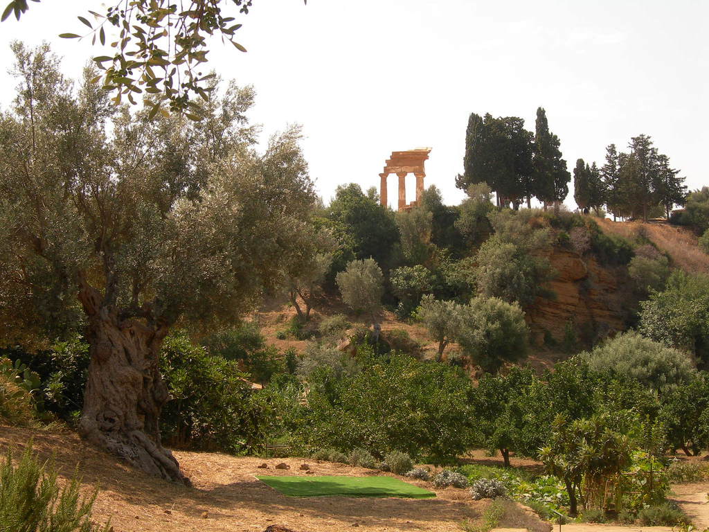 agrigento_kolymbetra